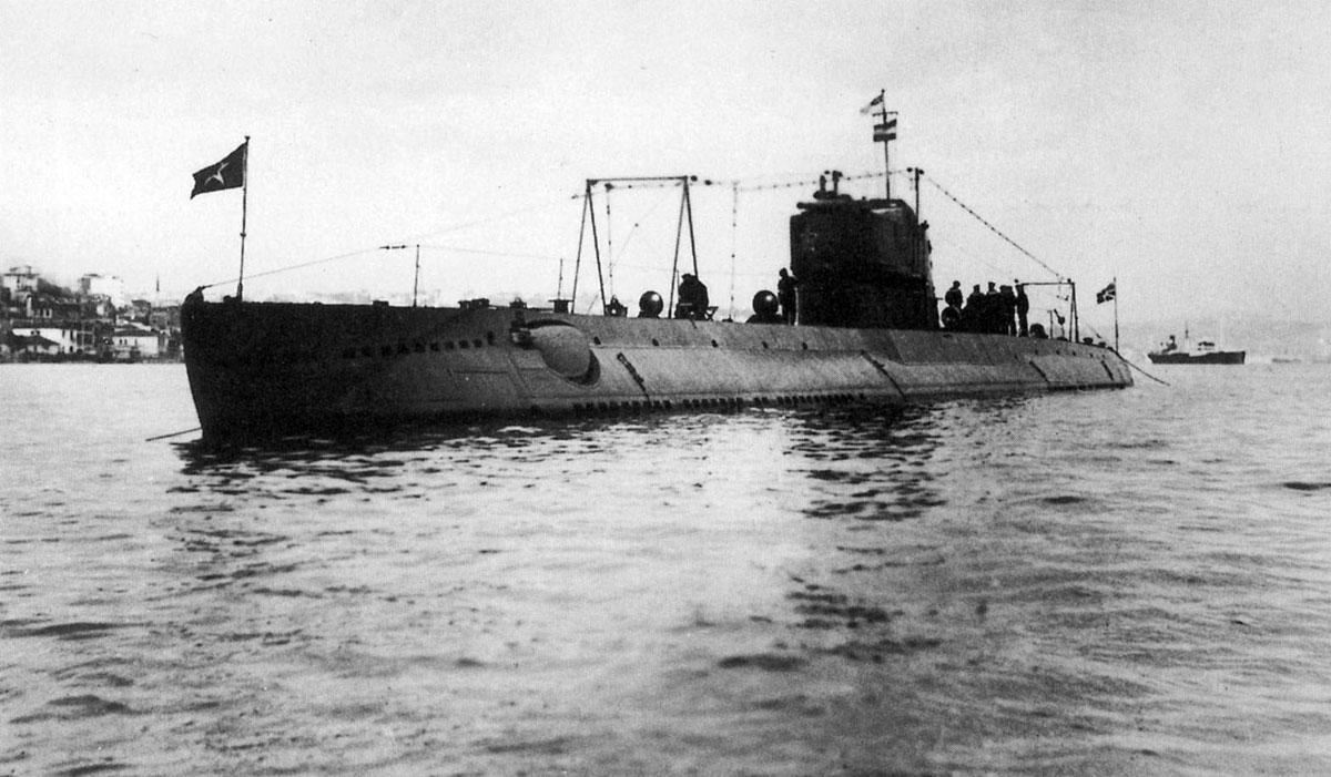 Подводная лодка Д-4 «Революционер» в Стамбуле